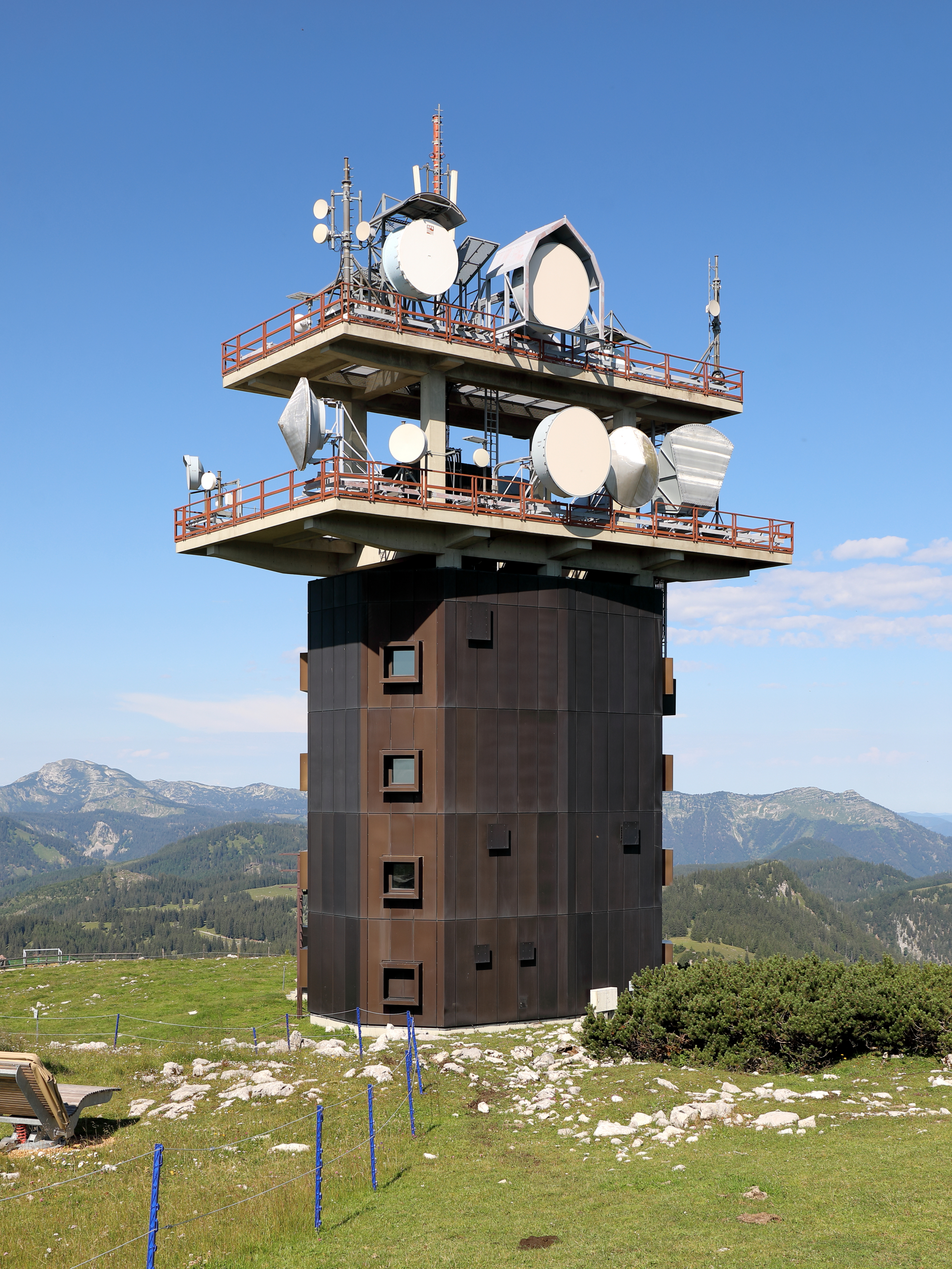 Ostansicht des Richtfunkturmes auf dem Gipfel der Gemeindealpe in der niederösterreichischen Gemeinde Mitterbach bei Mariazell.Der Richtfunkturm gehört zum „Richtfunknetz Mitte“. Dieses Richtfunknetz umfasst eine zweite Richtfunkstrecke von Wien nach Feldkirch sowie eine Alpenquerung zwischen Salzburg und Klagenfurt. Aufgebaut wurde es ab 1973 mittels 22 neuen Relaisstationen. 15 davon sind im einheitlichen Stil errichtet; unter anderem diese hier auf der Gemeindealpe. Eröffnet wurde das neue Richtfunknetz 1981 (Streckenteil Wien-Roßbrand sowie Salzburg-Roßbrand-Klagenfurt).